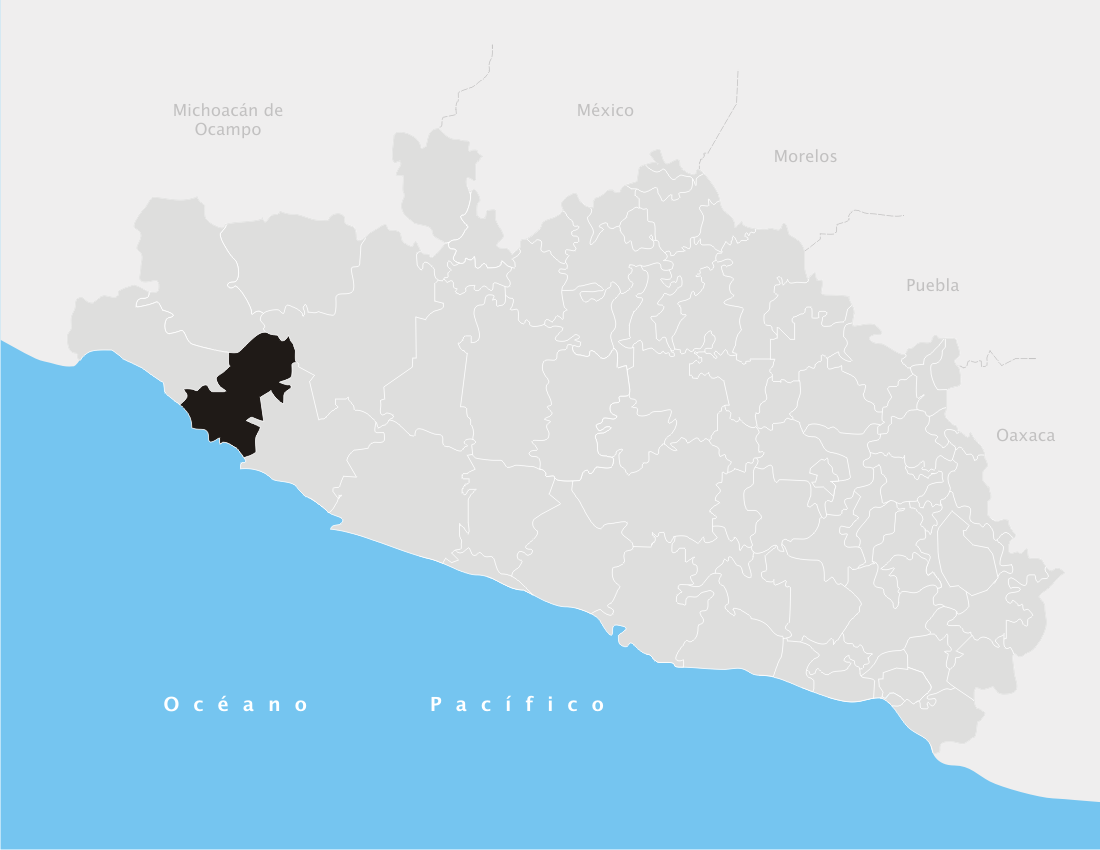 José Azueta en el estado de Guerrero (México)